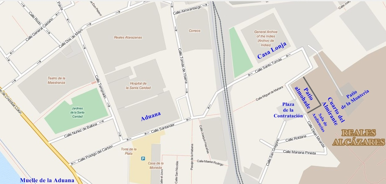 Casa de la Contratación de la Sevilla del siglo XVI y su entorno. This map may be incomplete, and may contain errors. Don't rely solely on it for navigation.